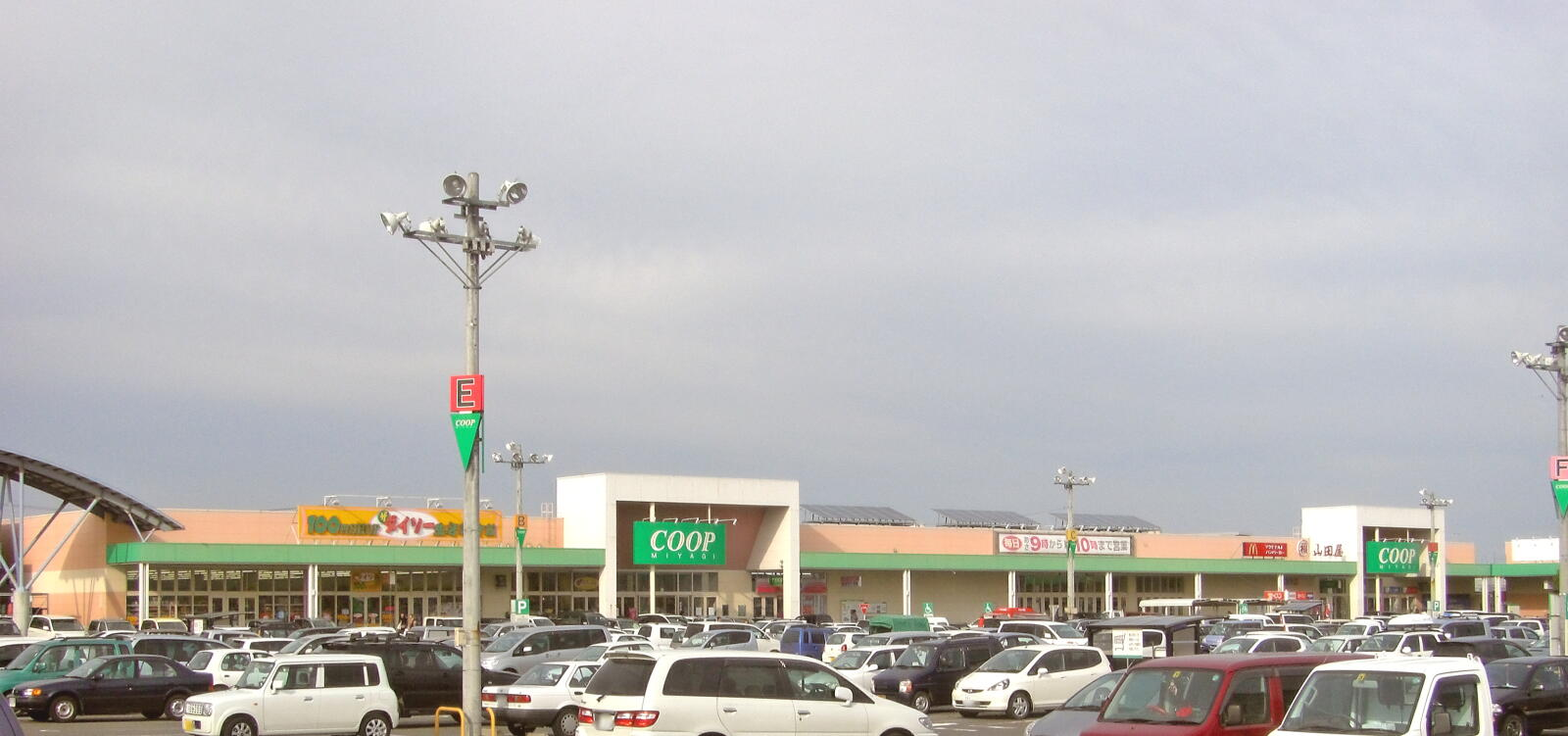 みやぎ生協亘理店